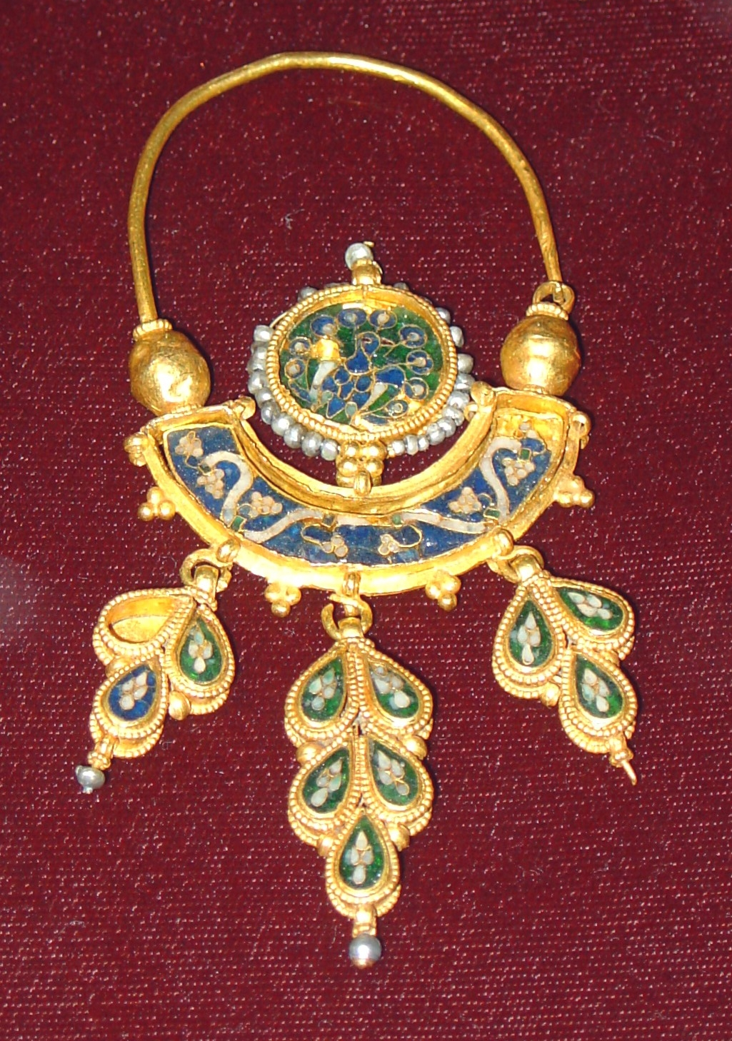 Bijou provenant du trésor de Vékili Preslav et exposé au musée archéologique de Preslav - Bulgarie